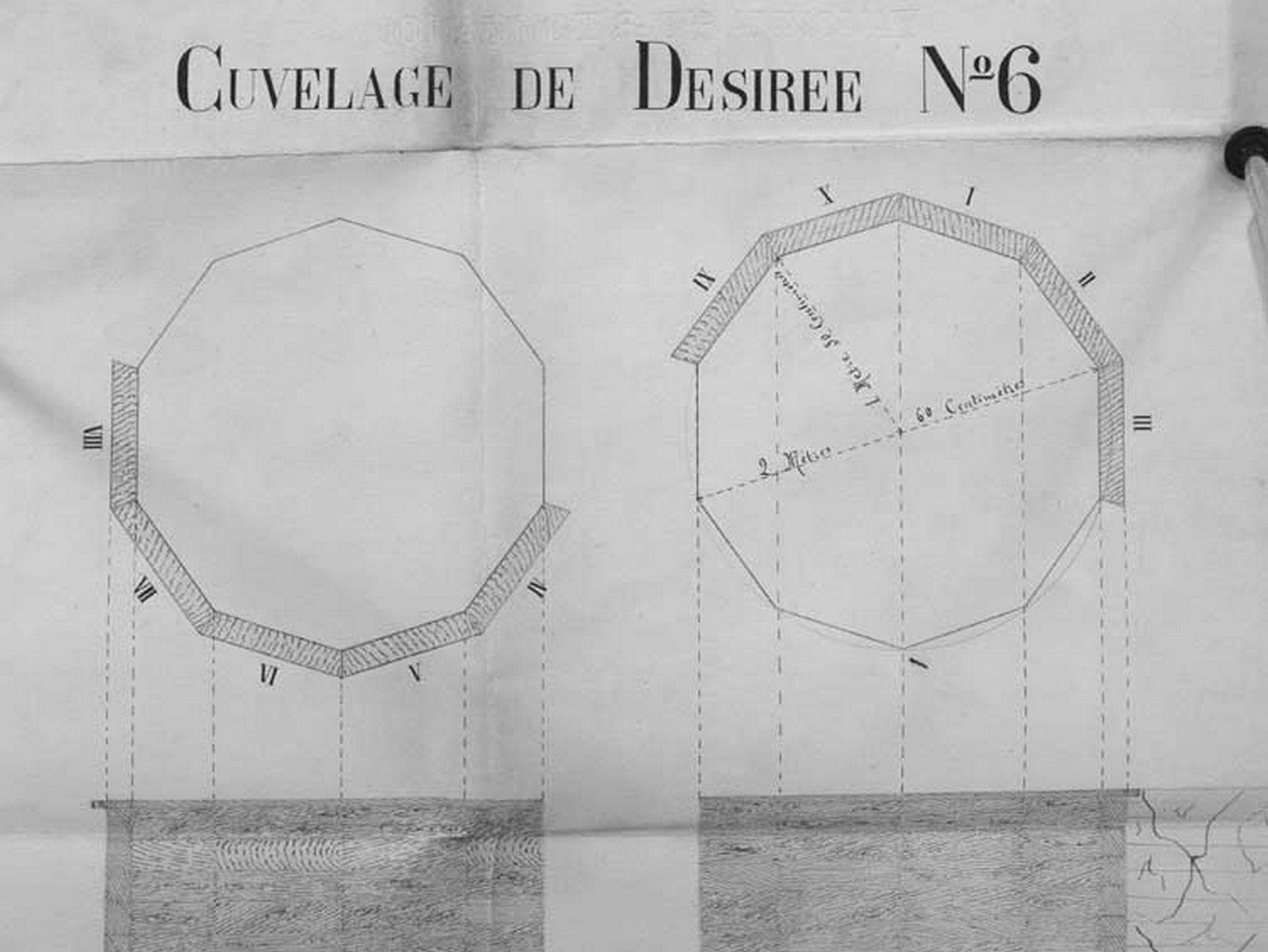 La fosse Désirée ou n° 6 de la Compagnie des mines de Douchy était un charbonnage constitué d'un seul puits situé à Lourches, Nord, Nord-Pas-de-Calais, France.